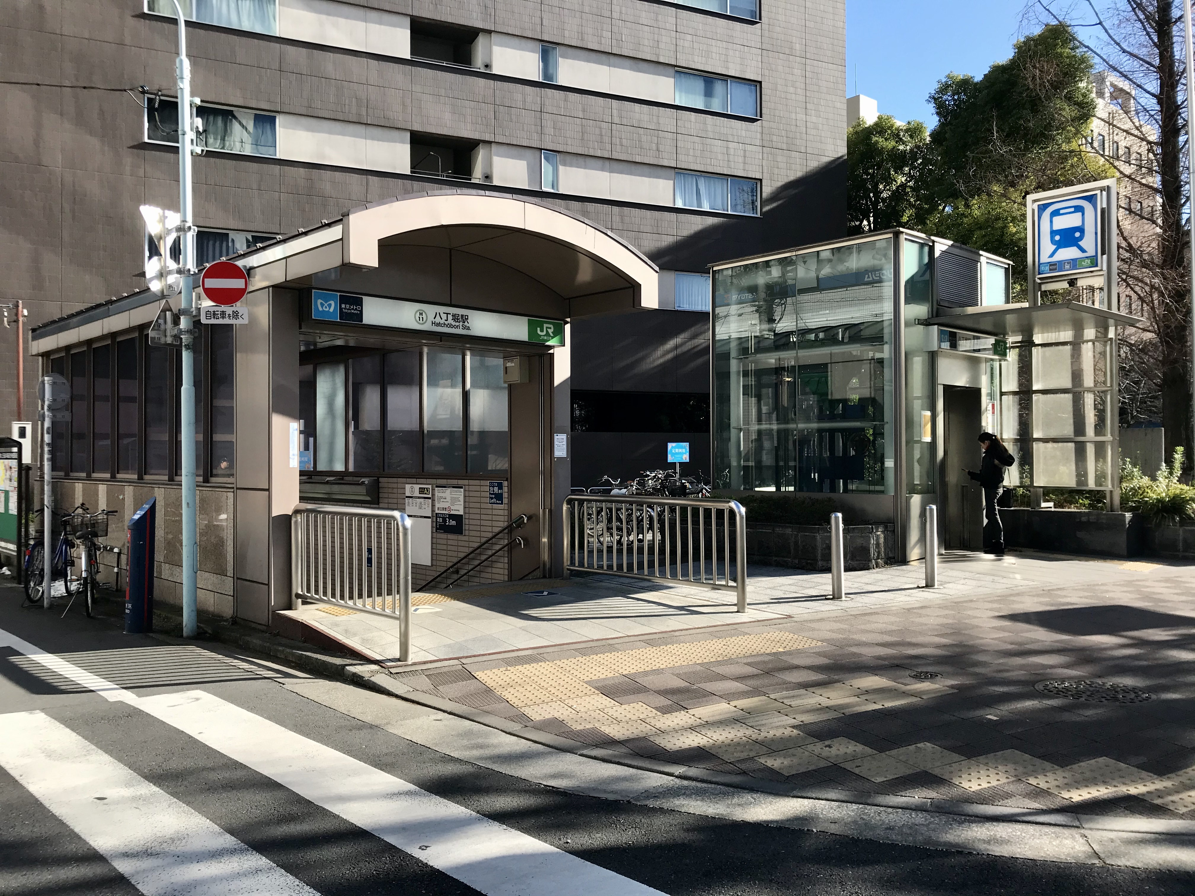 東京メトロ日比谷線・JR東日本京葉線八丁堀駅A2番出入口